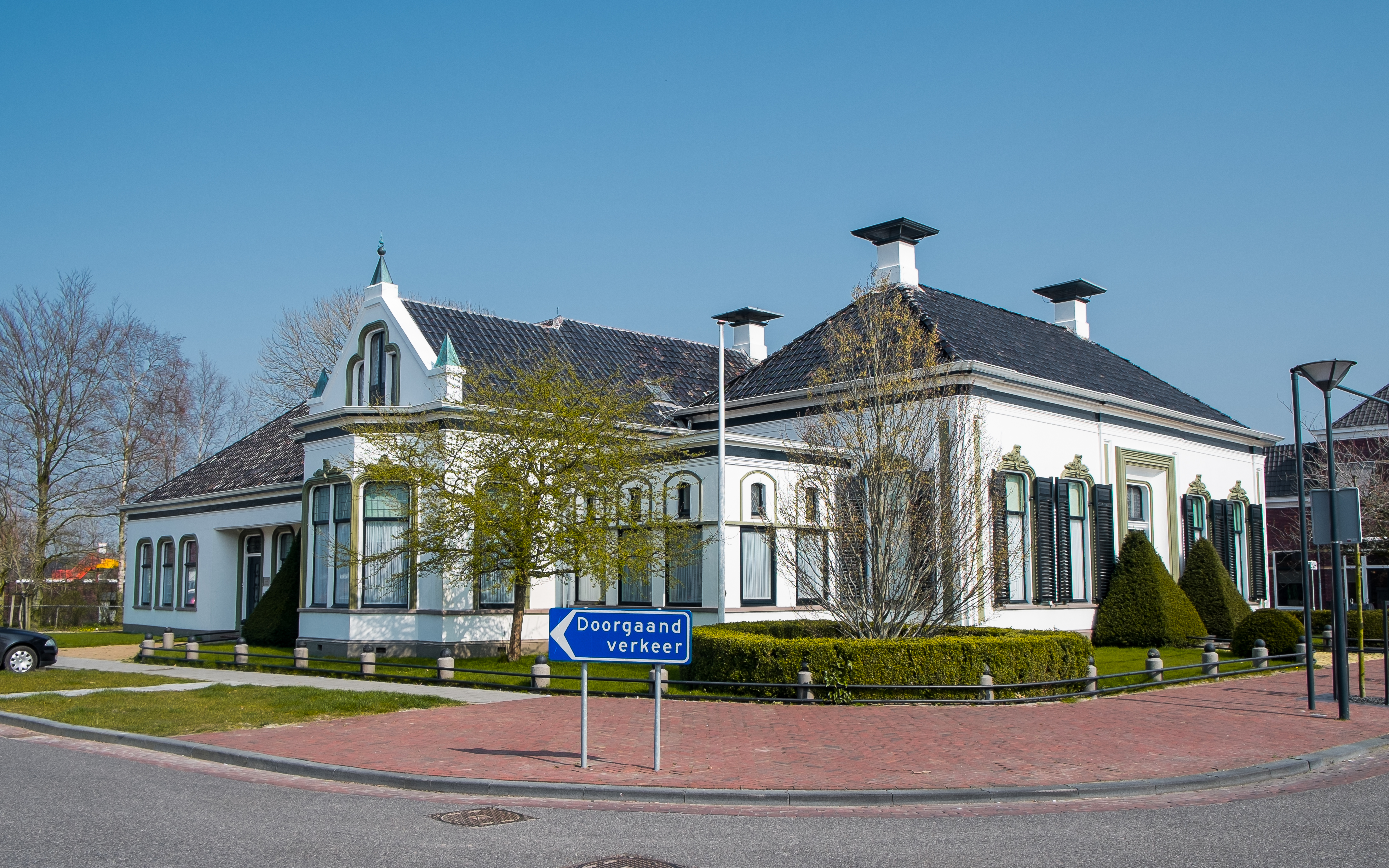 Herenhuis aan de Hoofdstraat 33 in Leens. Gebouwd in 1914. Geboortehuis van Hendrik Werkman